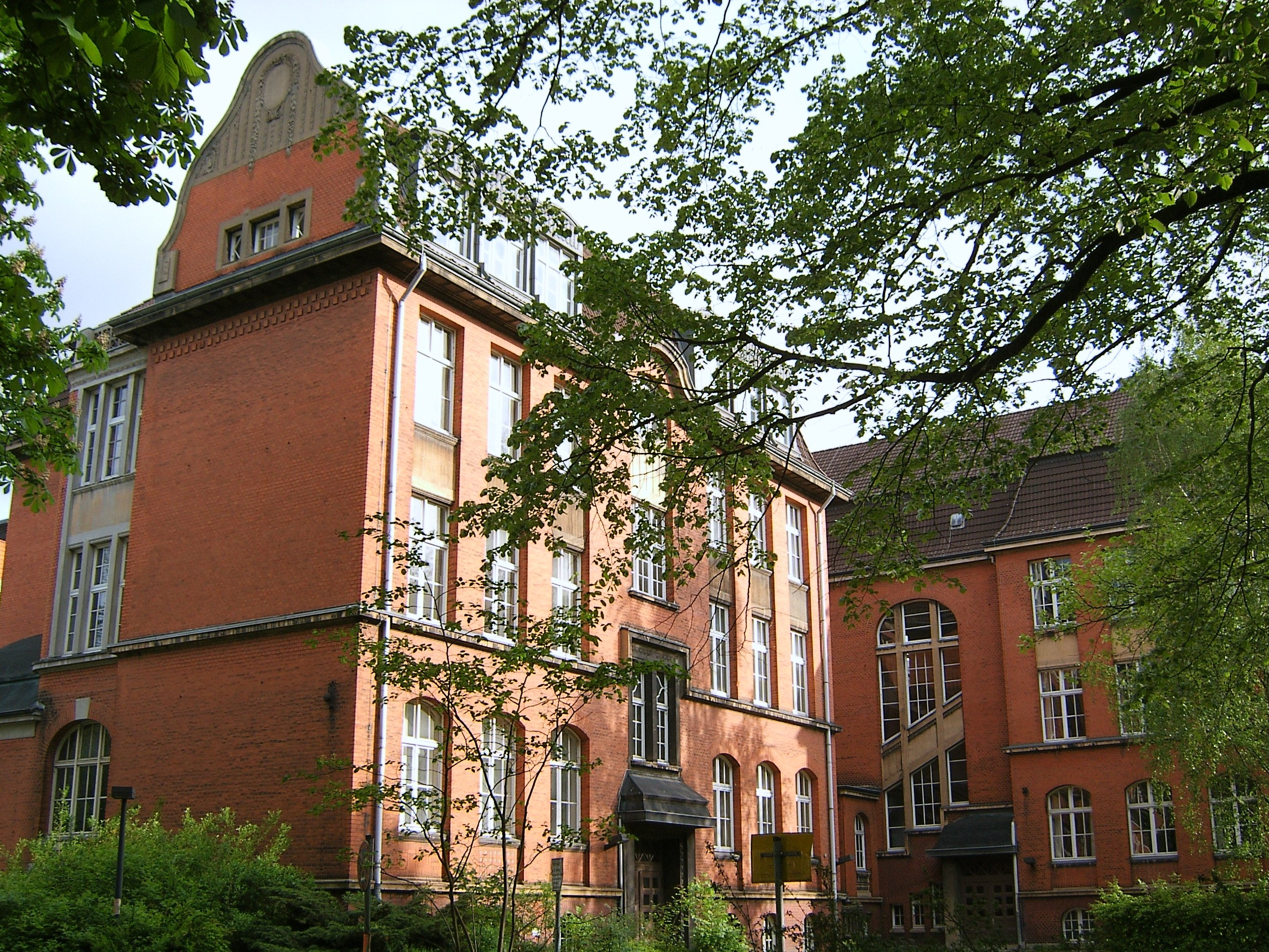 Die Talmud-Tora-Schule am Grindelhof 30 in Rotherbaum wurde 1909 bis 1911 nach Plänen von Ernst Friedheim als jüdische Oberrealschule erbaut. Von den Nationalsozialisten geschlossen beherbergte sie nach dem Zweiten Weltkrieg zunächst Universitätsinstitute und später den Fachbereich Bibliothekswesen der Fachhochschule Hamburg. Heute ist dort neben der Verwaltung der Jüdischen Gemeinde Hamburg auch wieder eine jüdische Schule untergebracht.This is a photograph of an architectural monument.